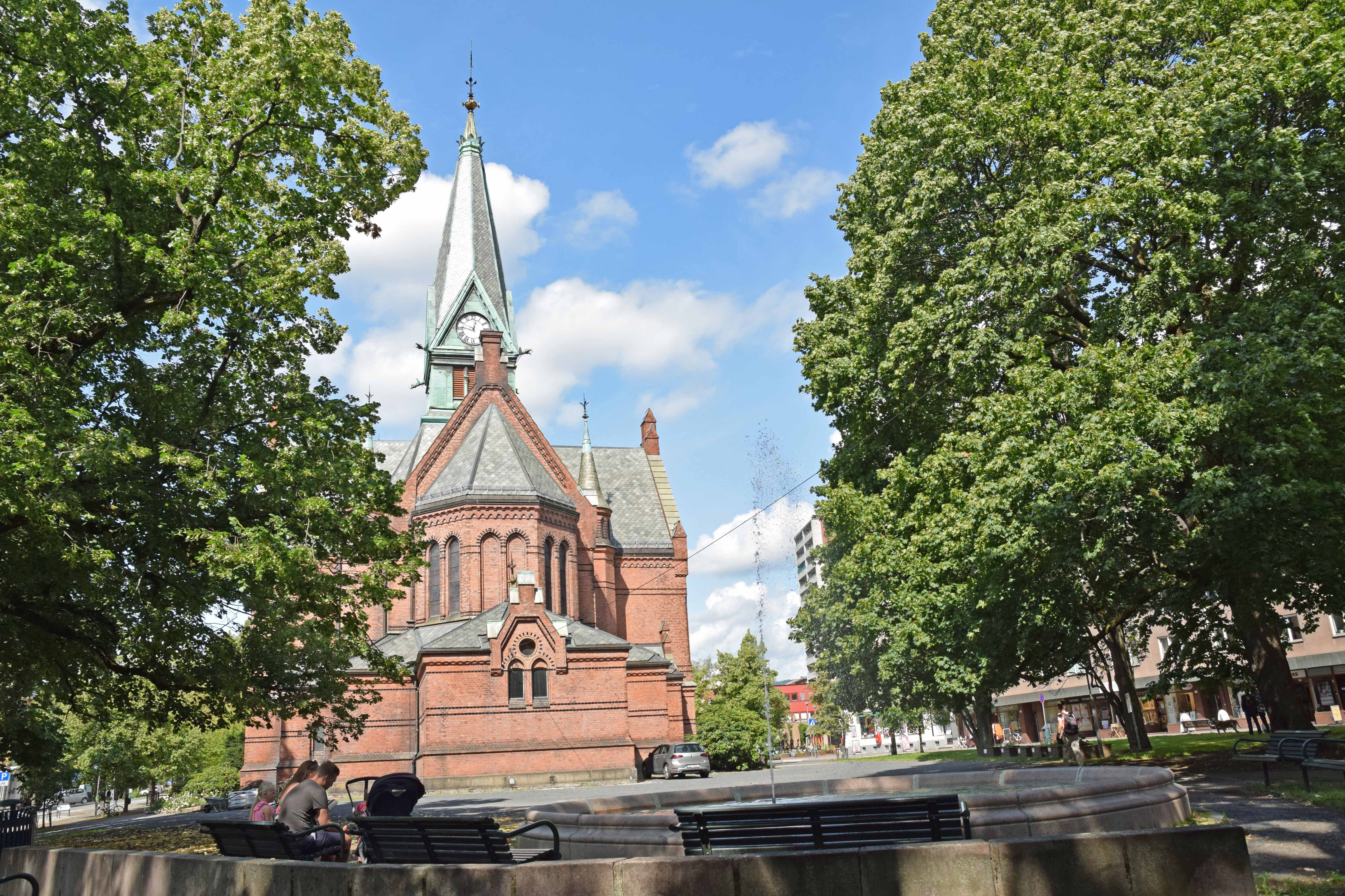 Sagene kirkepark, Oslo, med fontenen og Sagene kirke. Arendalsgata til høyre.